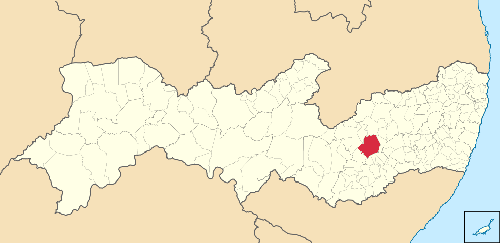 Mapa de São Bento do Una (2)